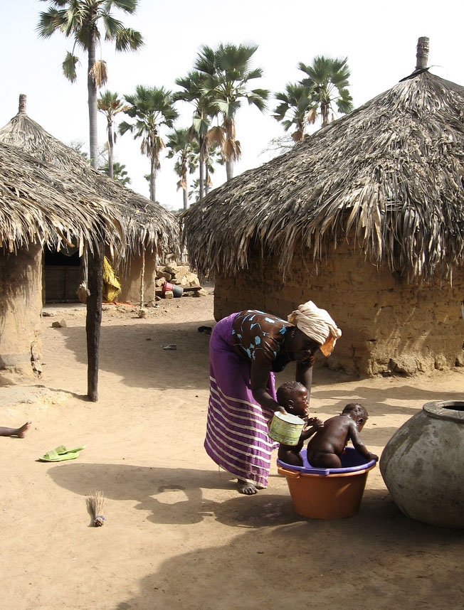 Soins aux enfants dans un village sérère du Siné Saloum, Sénégal